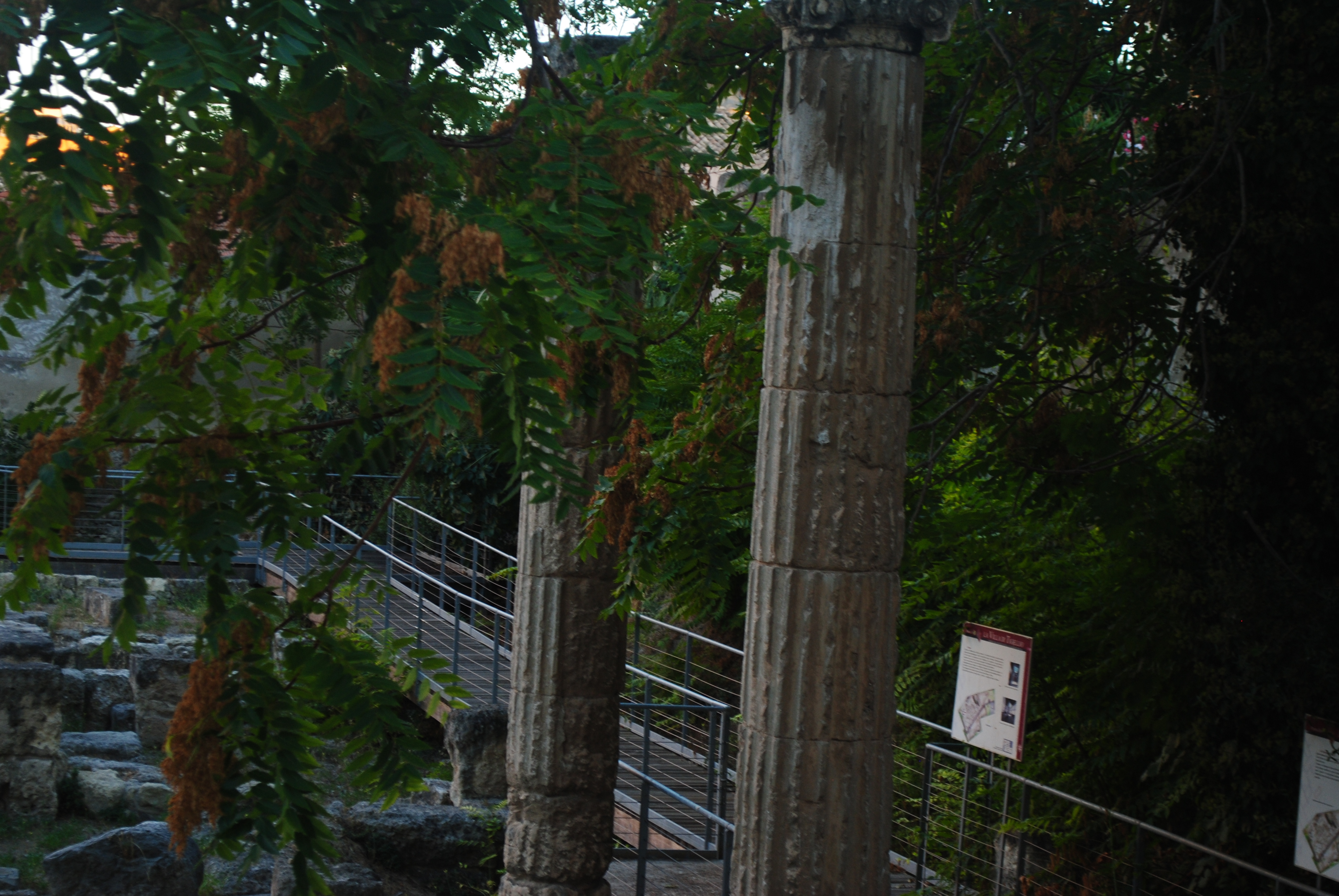 Villa di Tigellio a Cagliari This is a photo of a monument which is part of cultural heritage of Italy.